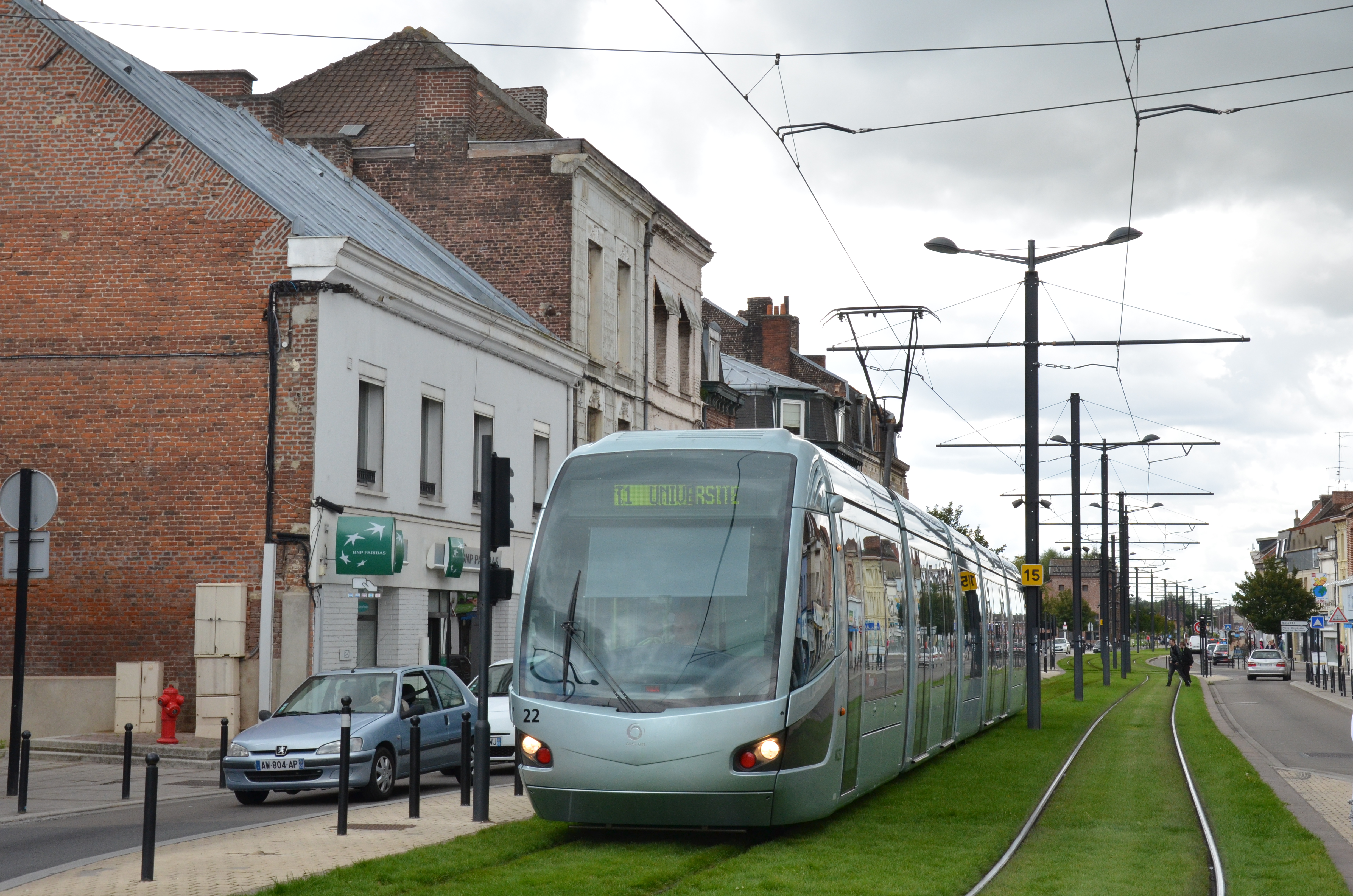 Alstom Citadis 302 n°22 sur la ligne T1 du réseau TRANSVILLES de Valenciennes, près du terminus Espace Villars à Denain.